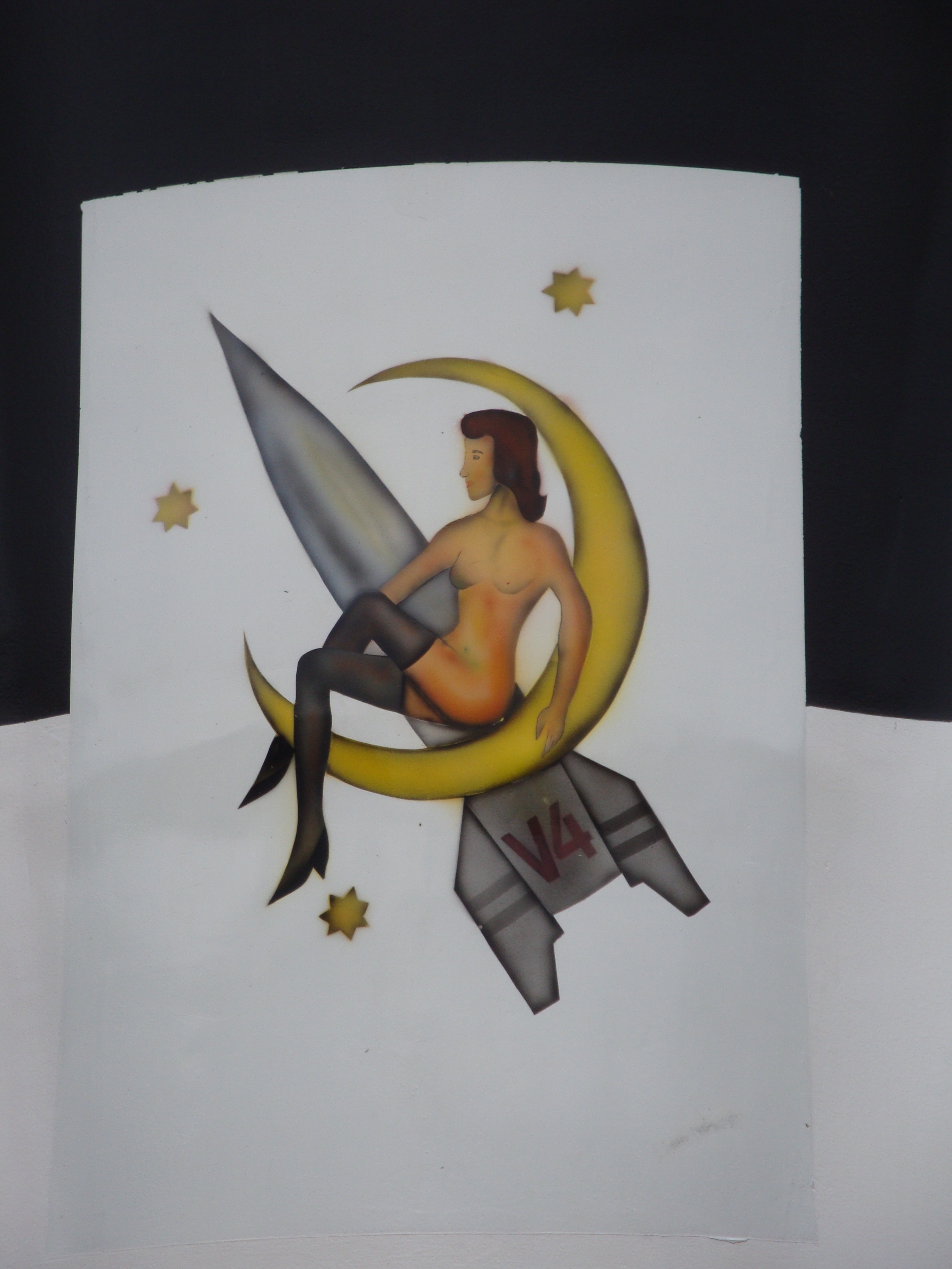 Originalgetreue Bemalung der V2